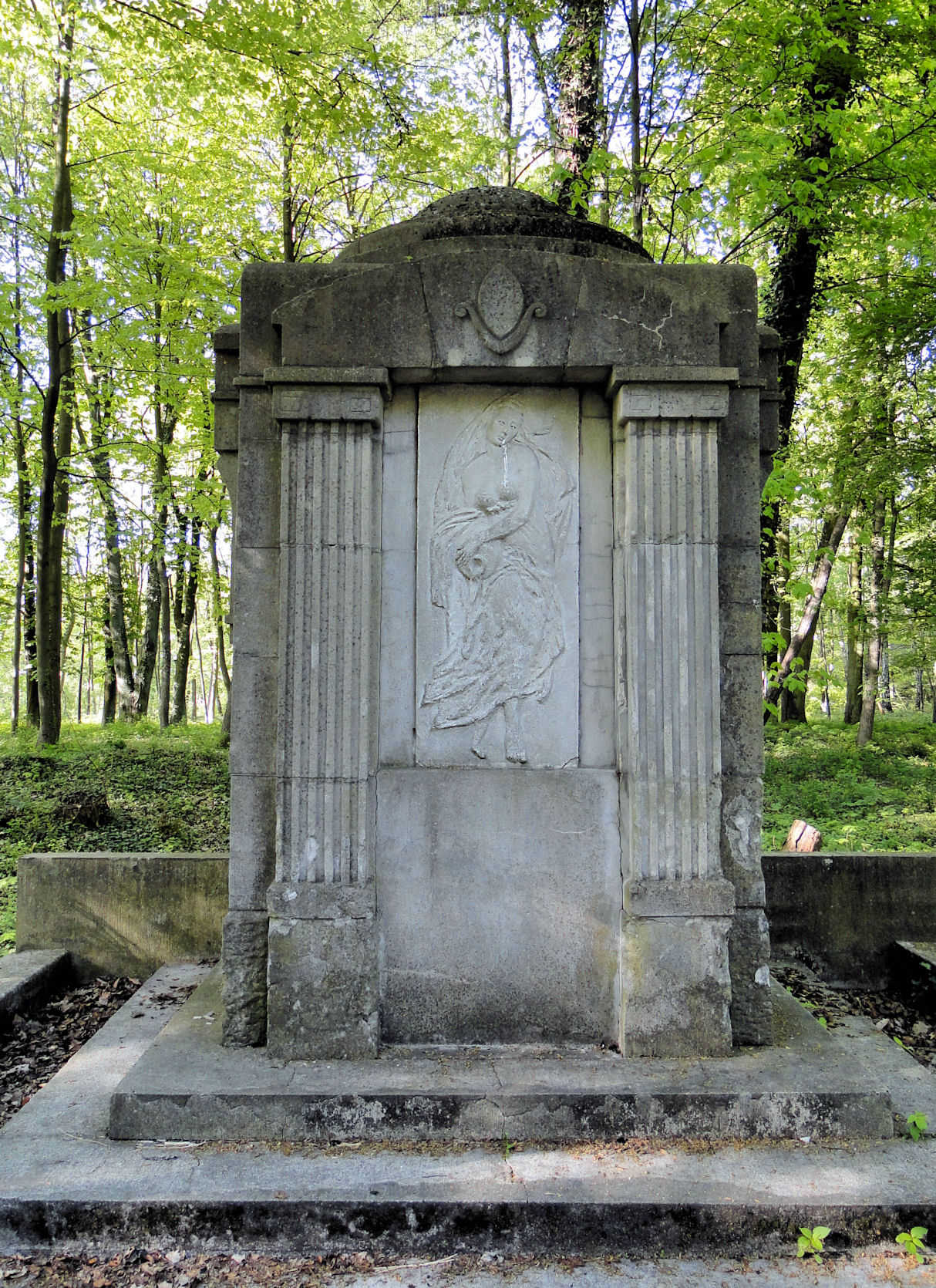 Pomnik przy Grocie za Łukami w Szczecinie Zdrojach